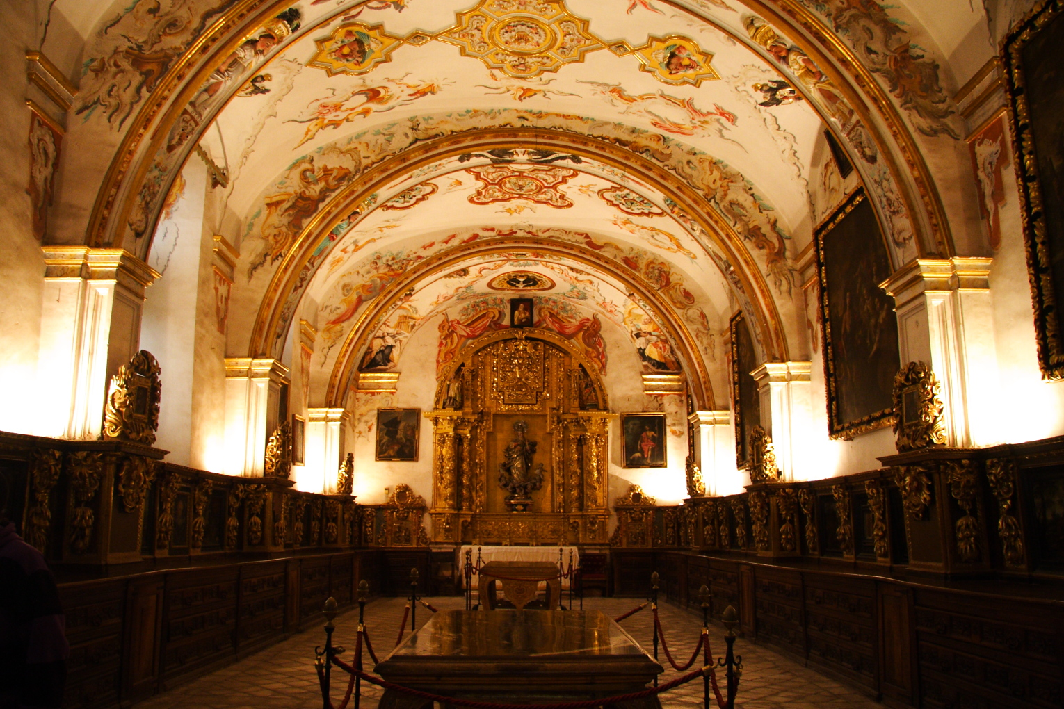 Monasterio de San Millán de Yuso